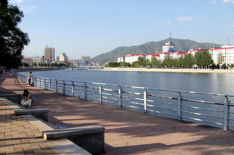 河北省张家口市境内清水河。